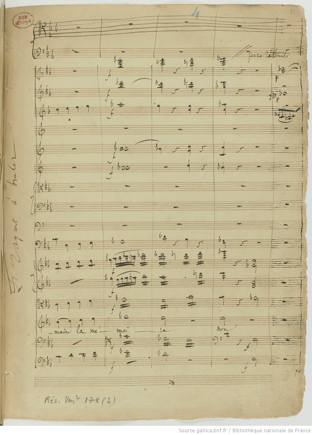 page manuscrite de "Sardanapale" d'Hector Berlioz, cantate pour le prix de Rome, 1830